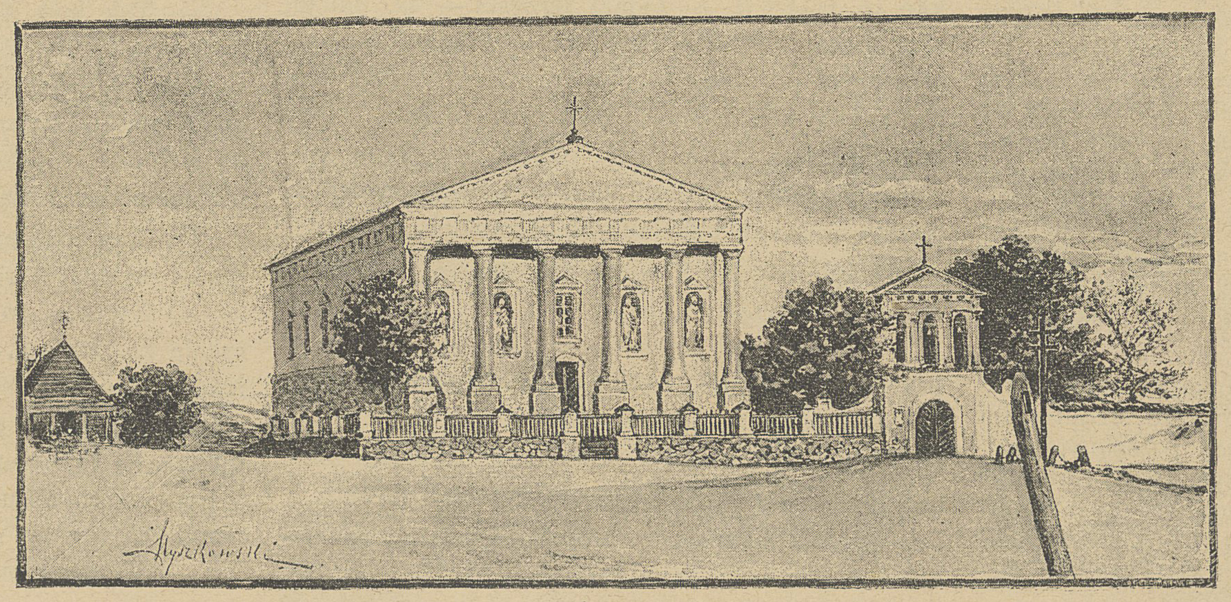 Беларуская (тарашкевіца): Валожын (Vałožyn), пляц Рынак (plac Rynak). Касьцёл Сьвятога Язэпа пры кляштары бэрнардынаў